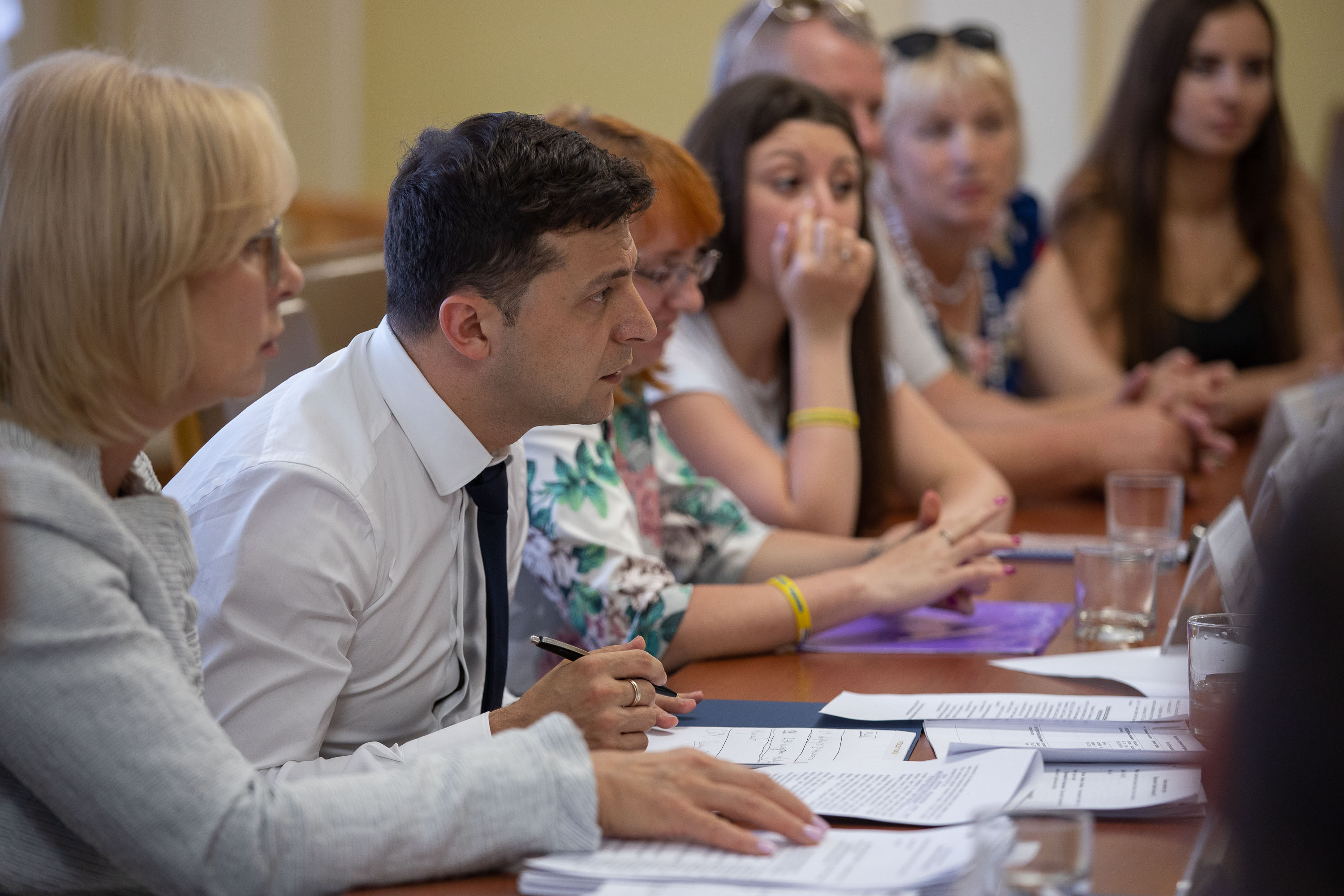 Президент України Володимир Зеленський зустрівся з родинами українських моряків, які були затримані торік біля Керченської протоки.